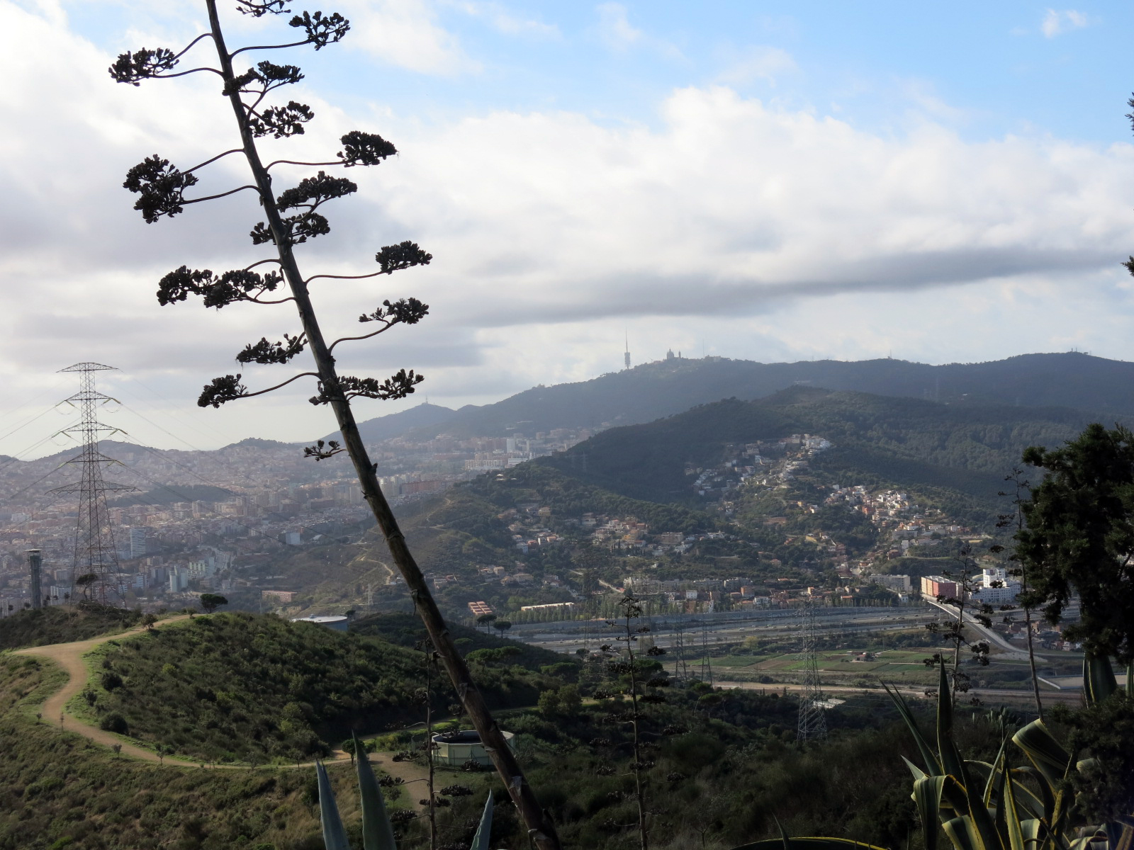 Vallbona i Torre Baró des del Puig Castellar